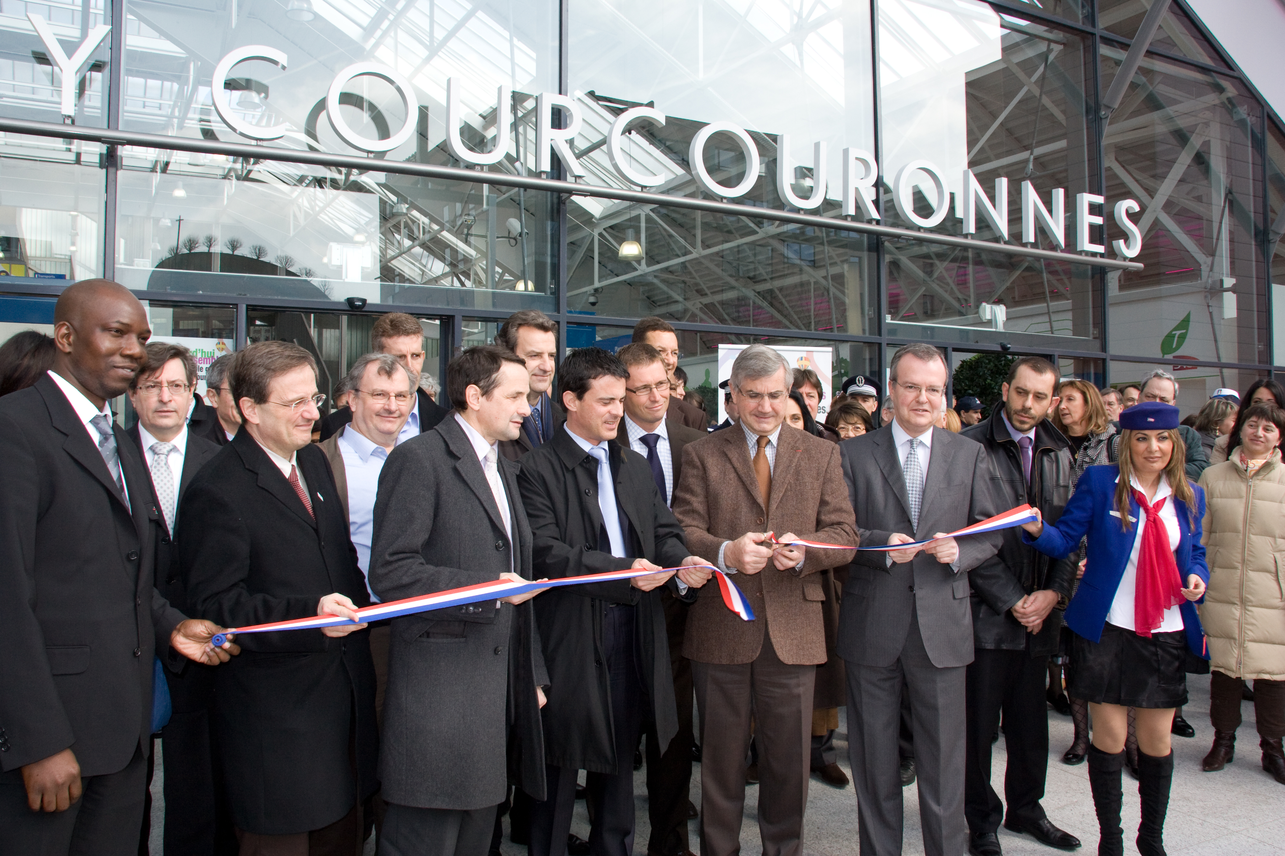 Gare d'Evry-Courcouronnes , Evry, département de l'Essonne, France